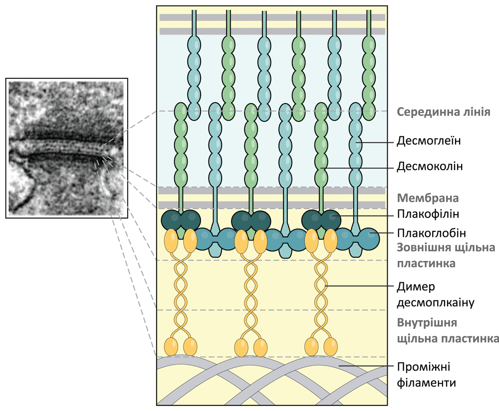 Схематичне зображення десмосоми, позначені головні білки, що входять до її складу, проте відображені не всі взаємодії між ними.